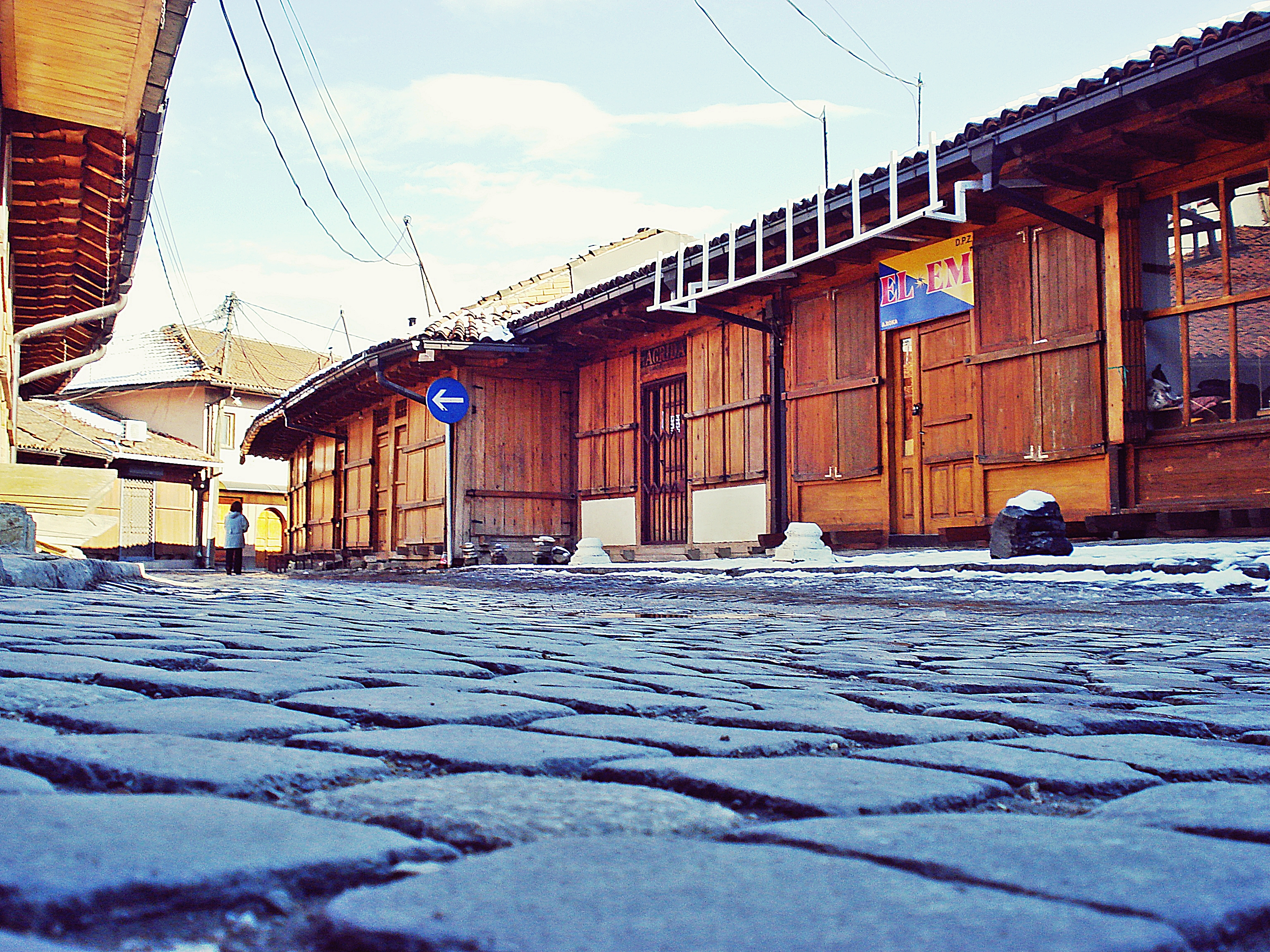 Qarshija e vjetër e Gjakovës, e rindërtuar pas lufte